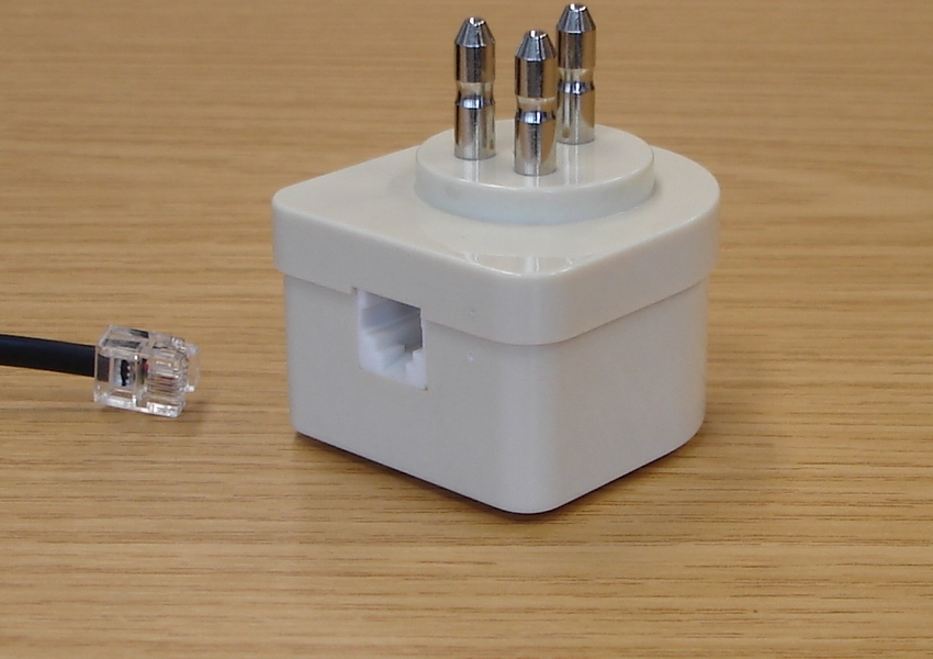 Telefonadapter RJ11 (Deutschland, USA, Spanien, Portugal, Griechenland) → Italien, Türkei